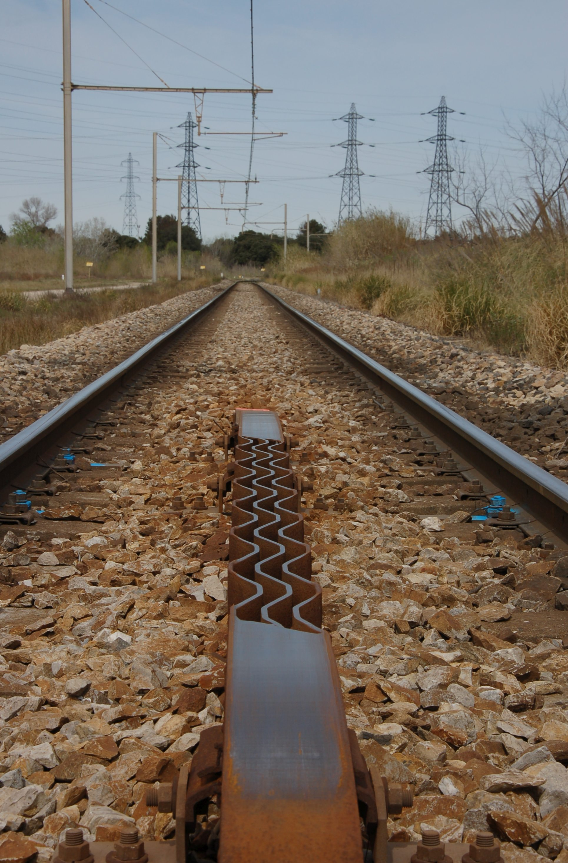 signalisation ferroviaire